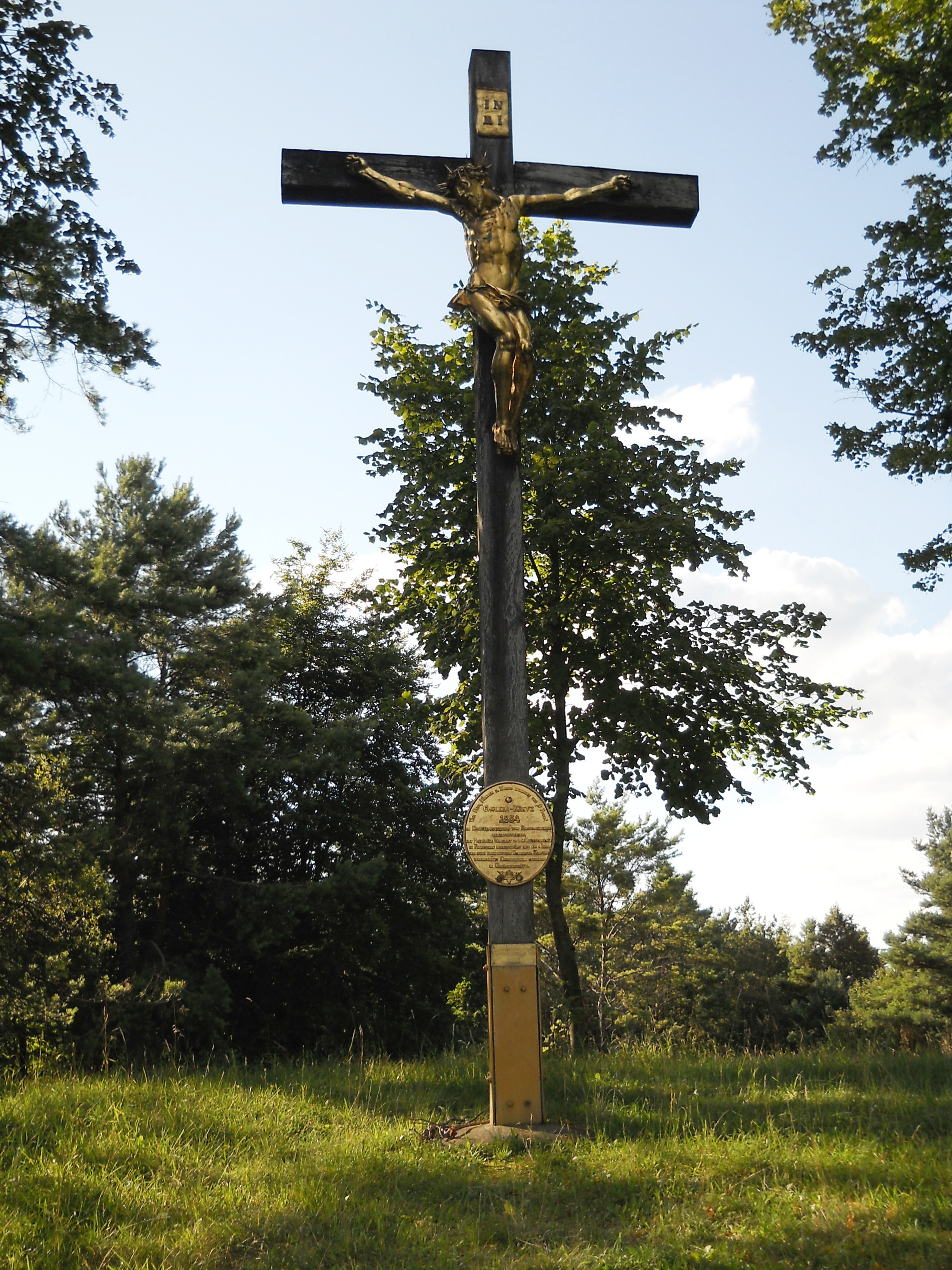 Das "Hohe Kreuz" (Cholerakreuz) von 1854 oberhalb von Eichstätt/Bayern bei Wintershof